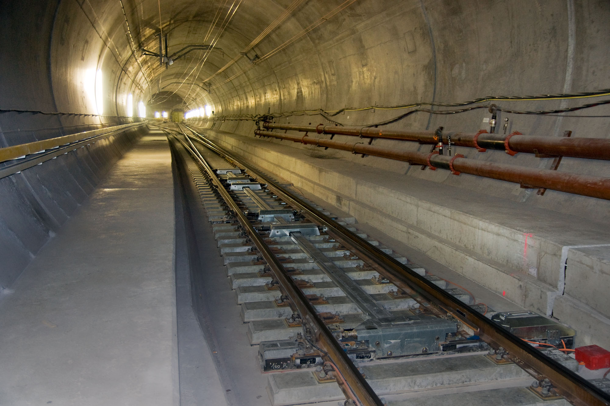 Bahnsteig der Nothaltestelle Faido links im Bild, Schnellfahrweiche im Gotthard-Basistunnel (rechts)